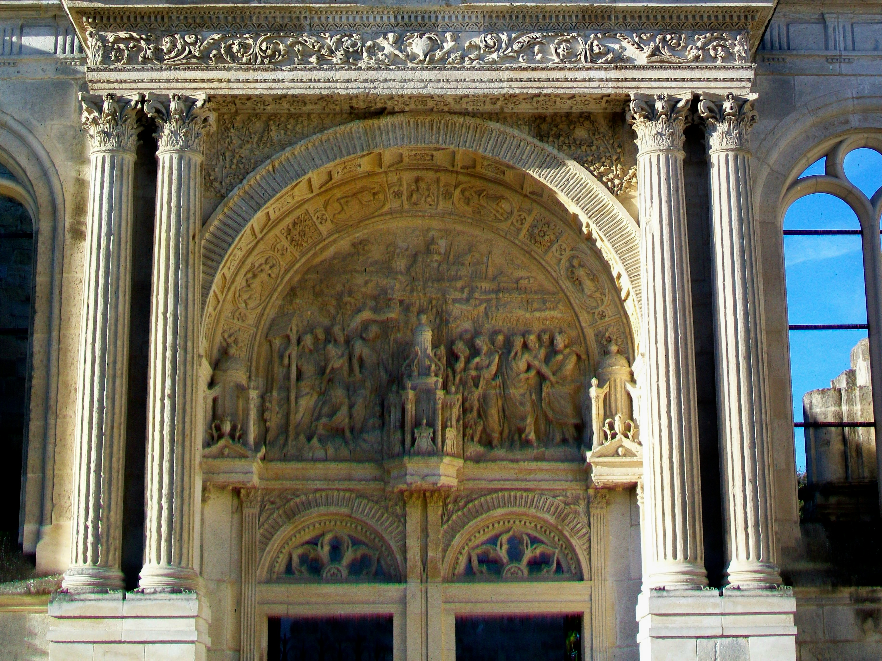 Tympan du portail Renaissance nord.